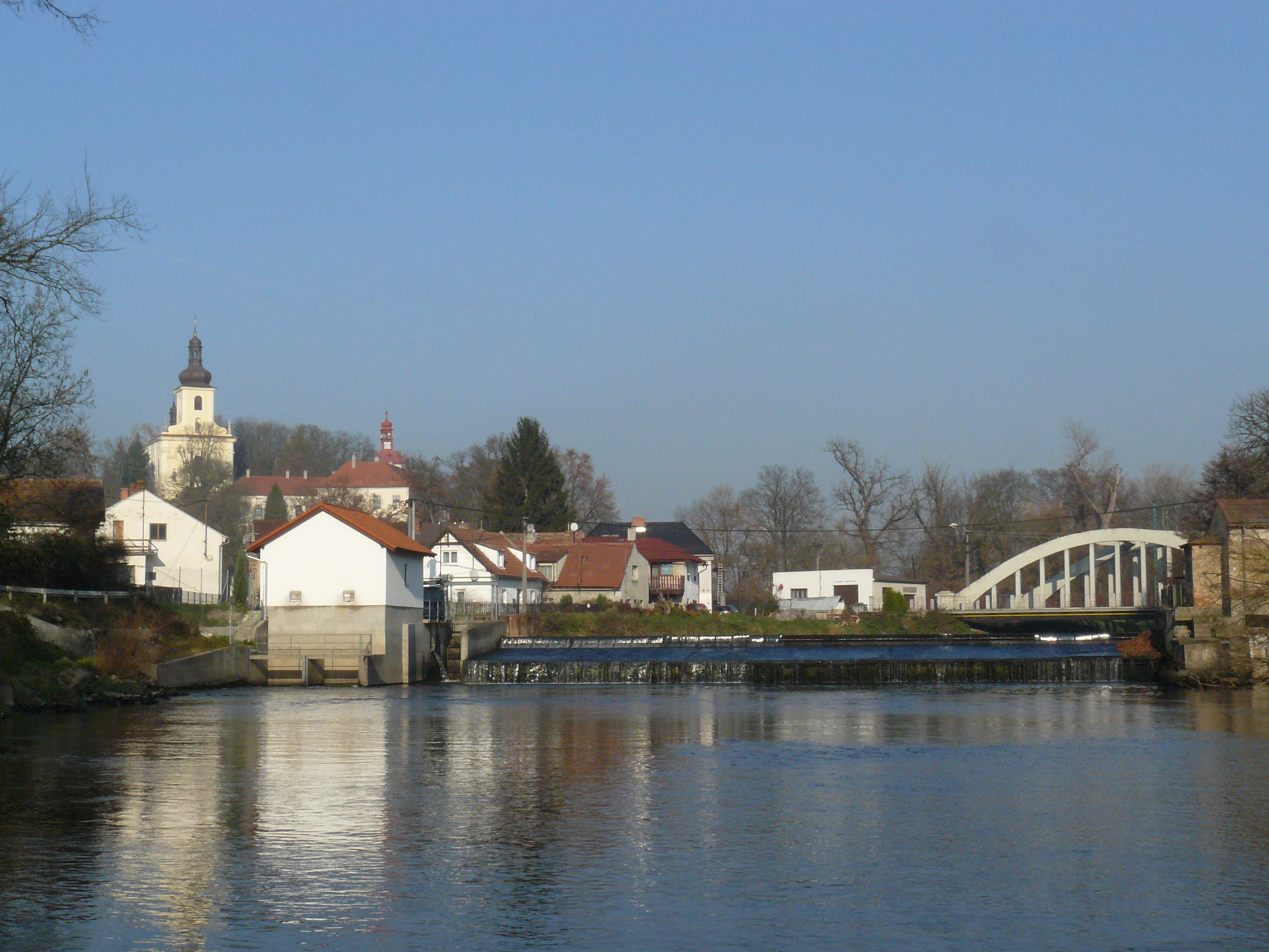 Horky nad Jizerou - pohled od jihu